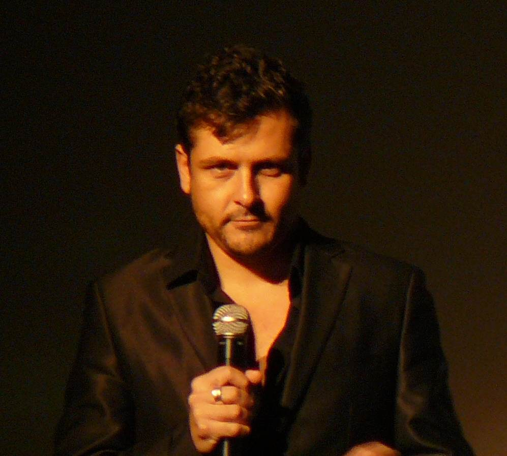 Kike Maillo au festival du film fantastique de Gérardmer de 2012